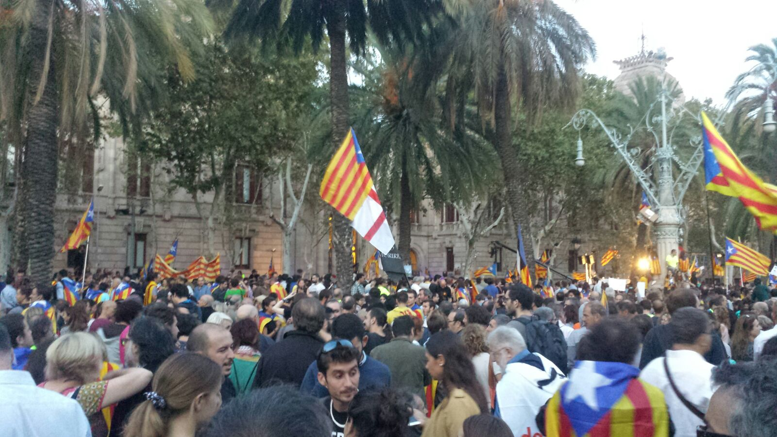 21 Setembre Arc Triomf